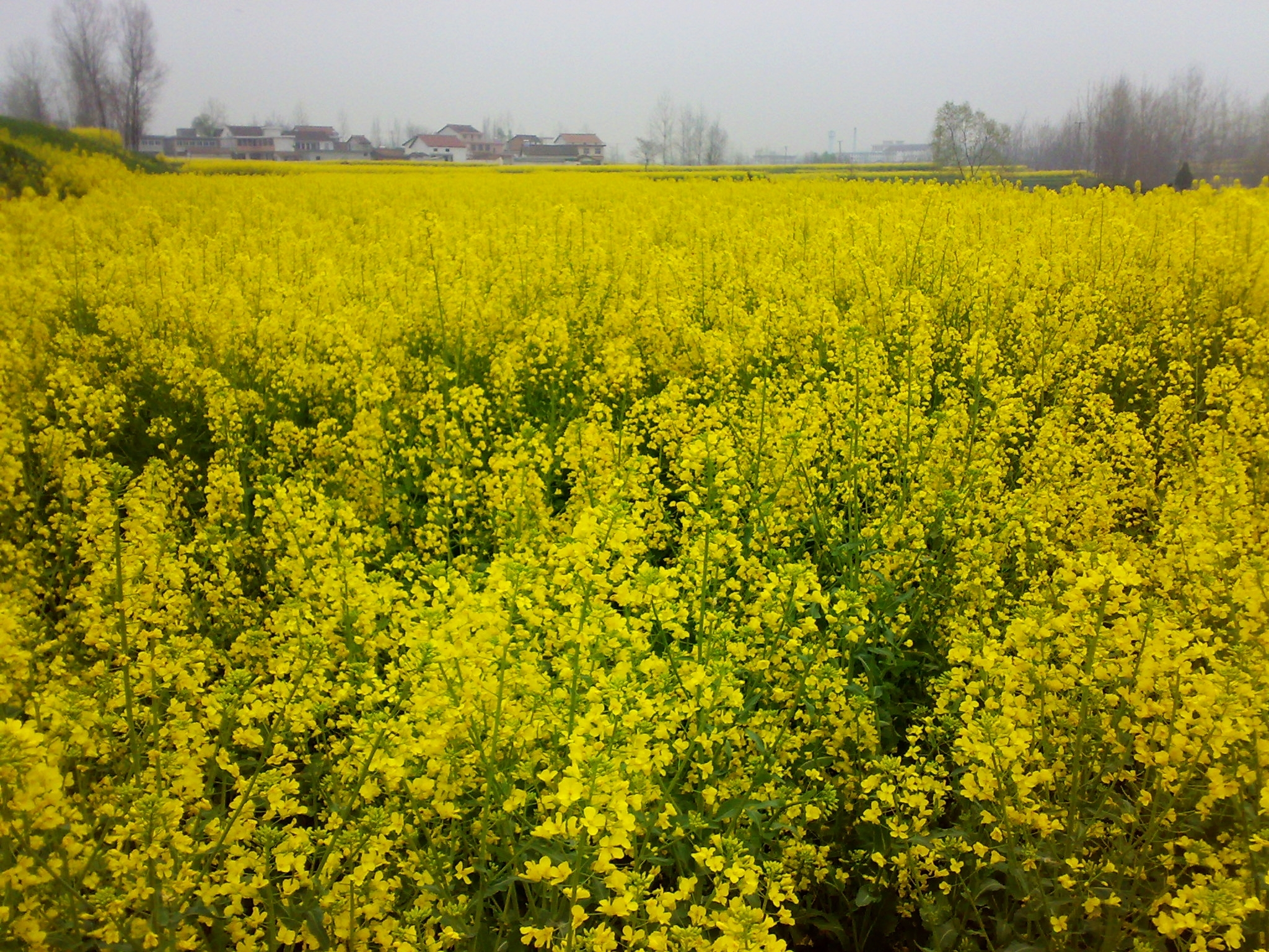 油菜花